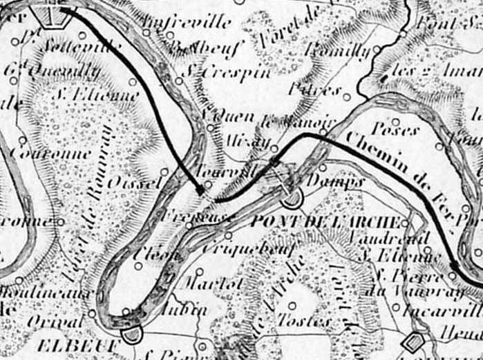 Extrait carte de 1845 du chemin de fer de Paris à Rouen